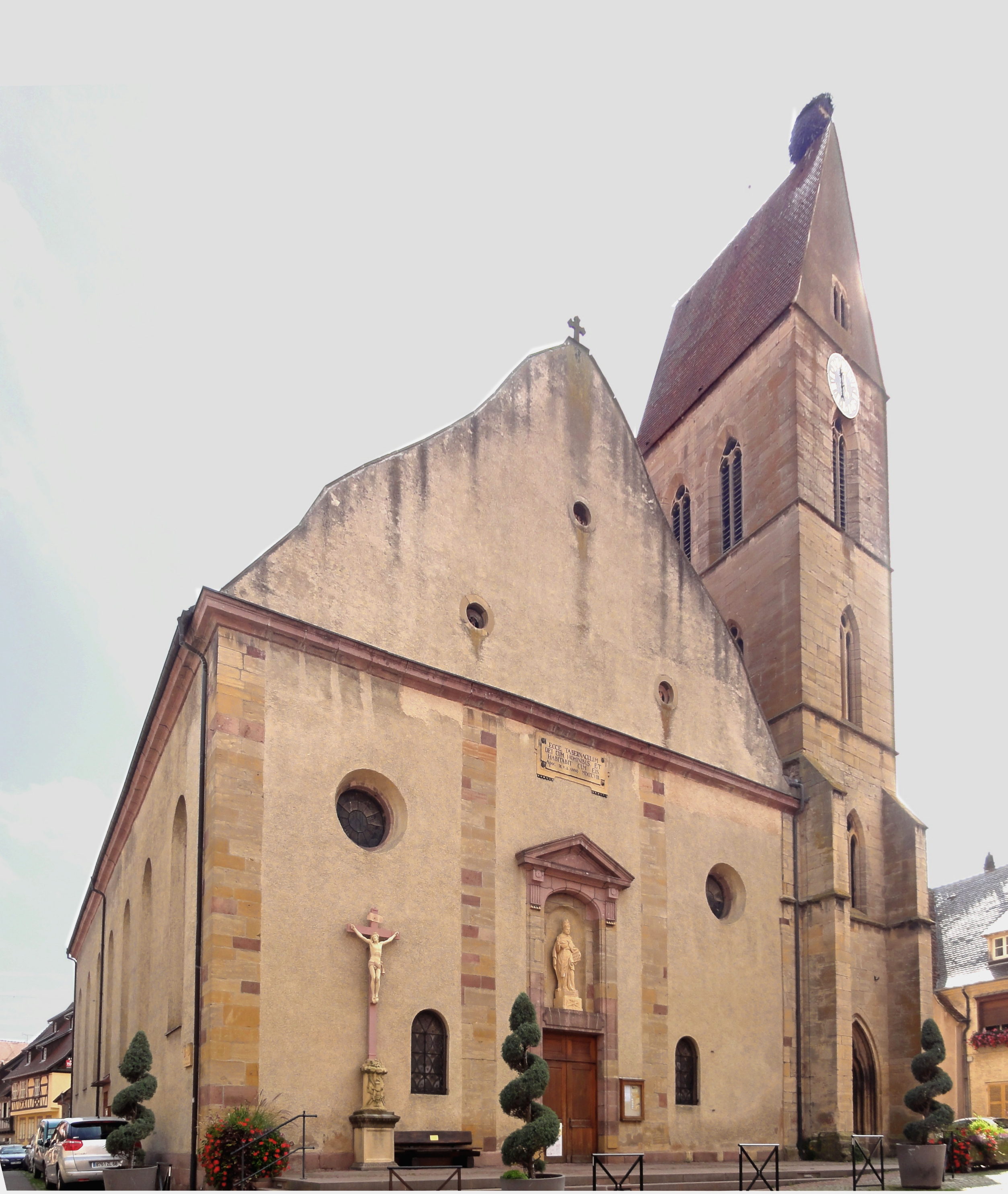 Alsace, Haut-Rhin, Église Saints-Pierre-et-Paul (XIIIe-XIXe) d'Eguisheim (PA00085415, IA68000505): Clocher gothique (1230) et nef (1808).